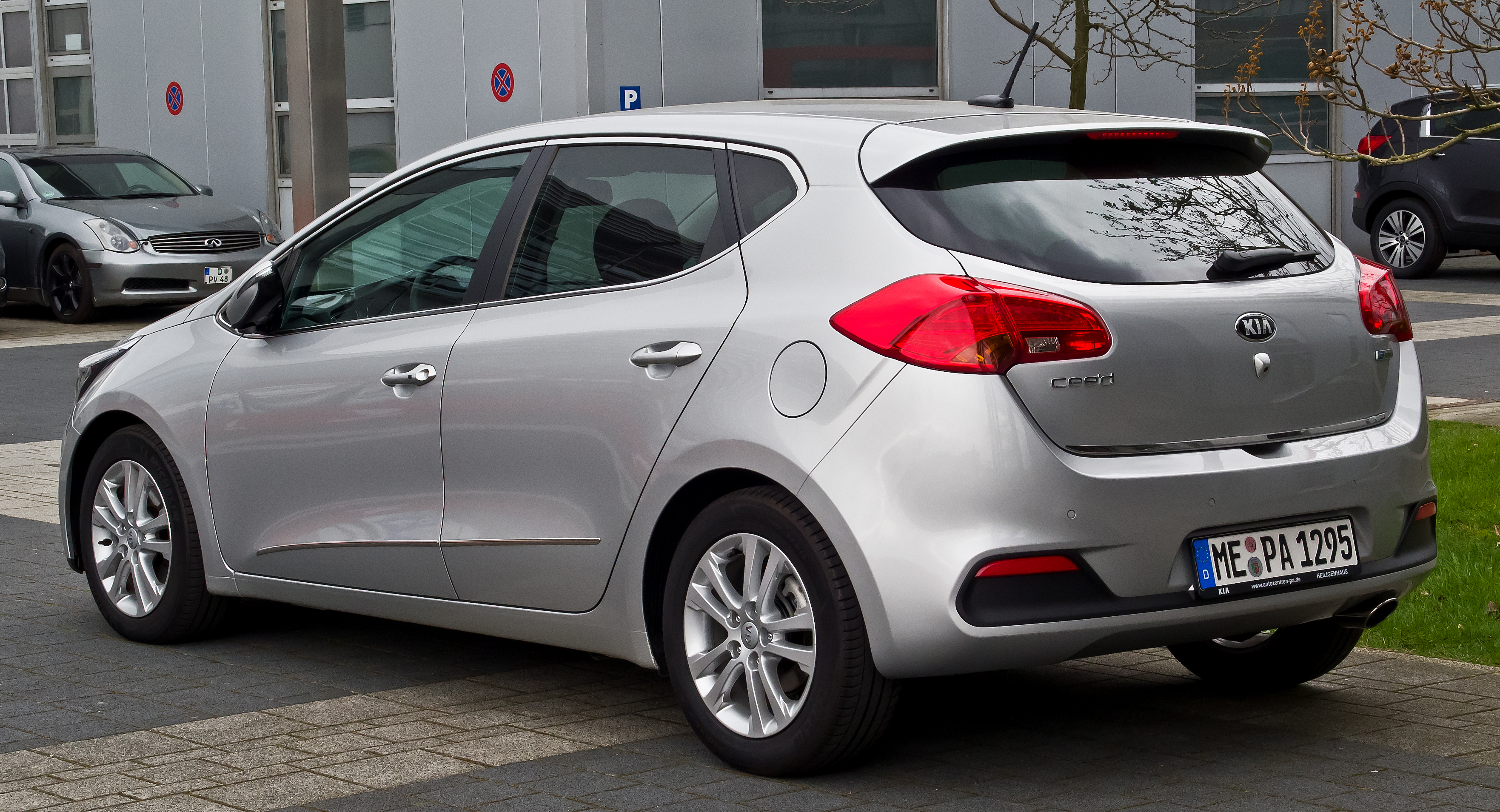 Kia cee'd 1.6 CRDi 128 Spirit (JD)